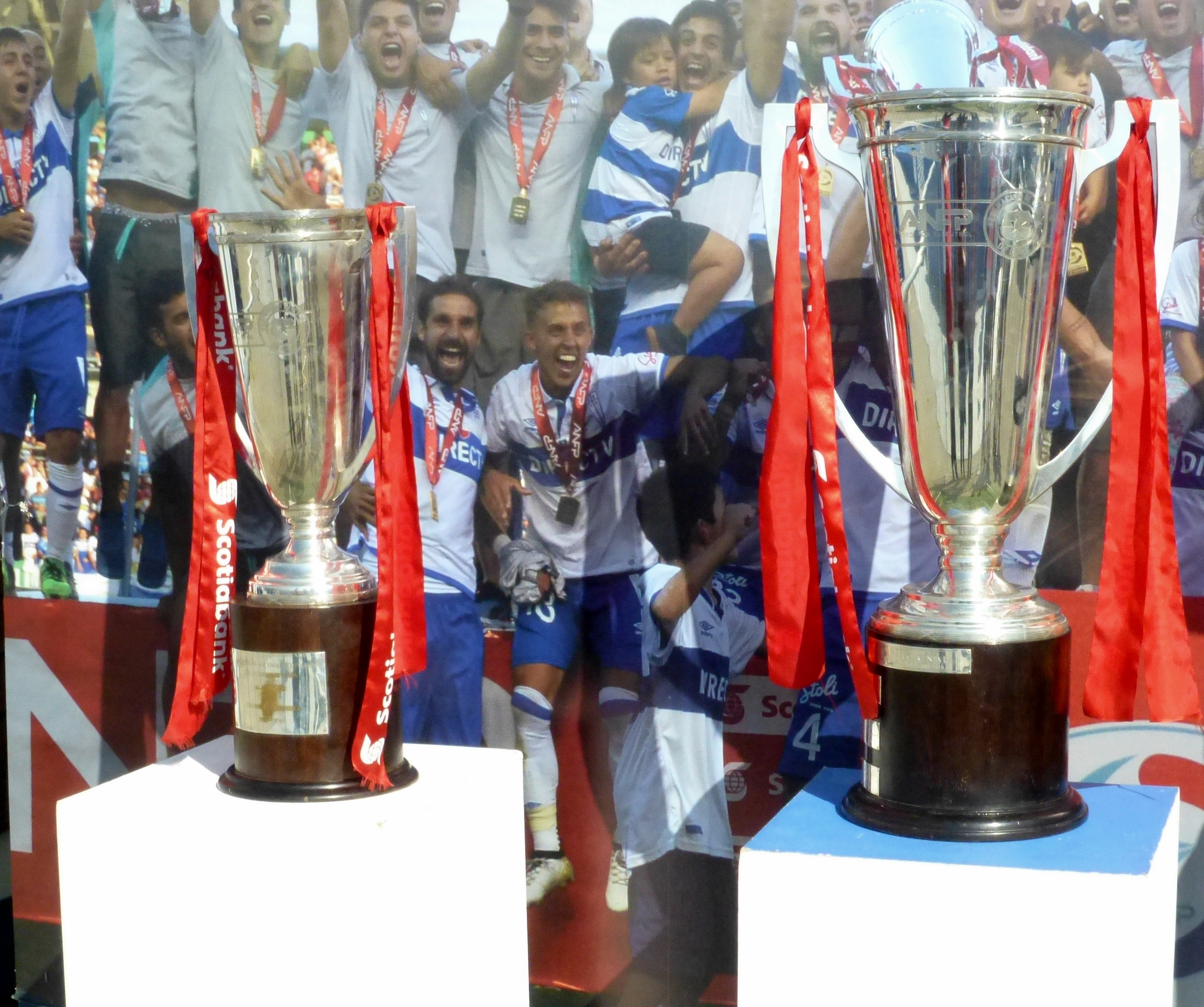 Trofeos del Clausura 2016 (réplica del Huemul de Plata) y Huemul de Plata correspondiente a la obtención del Apertura 2016